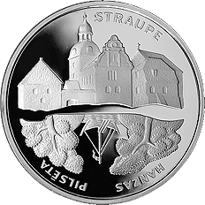 Latvian commemorative coin